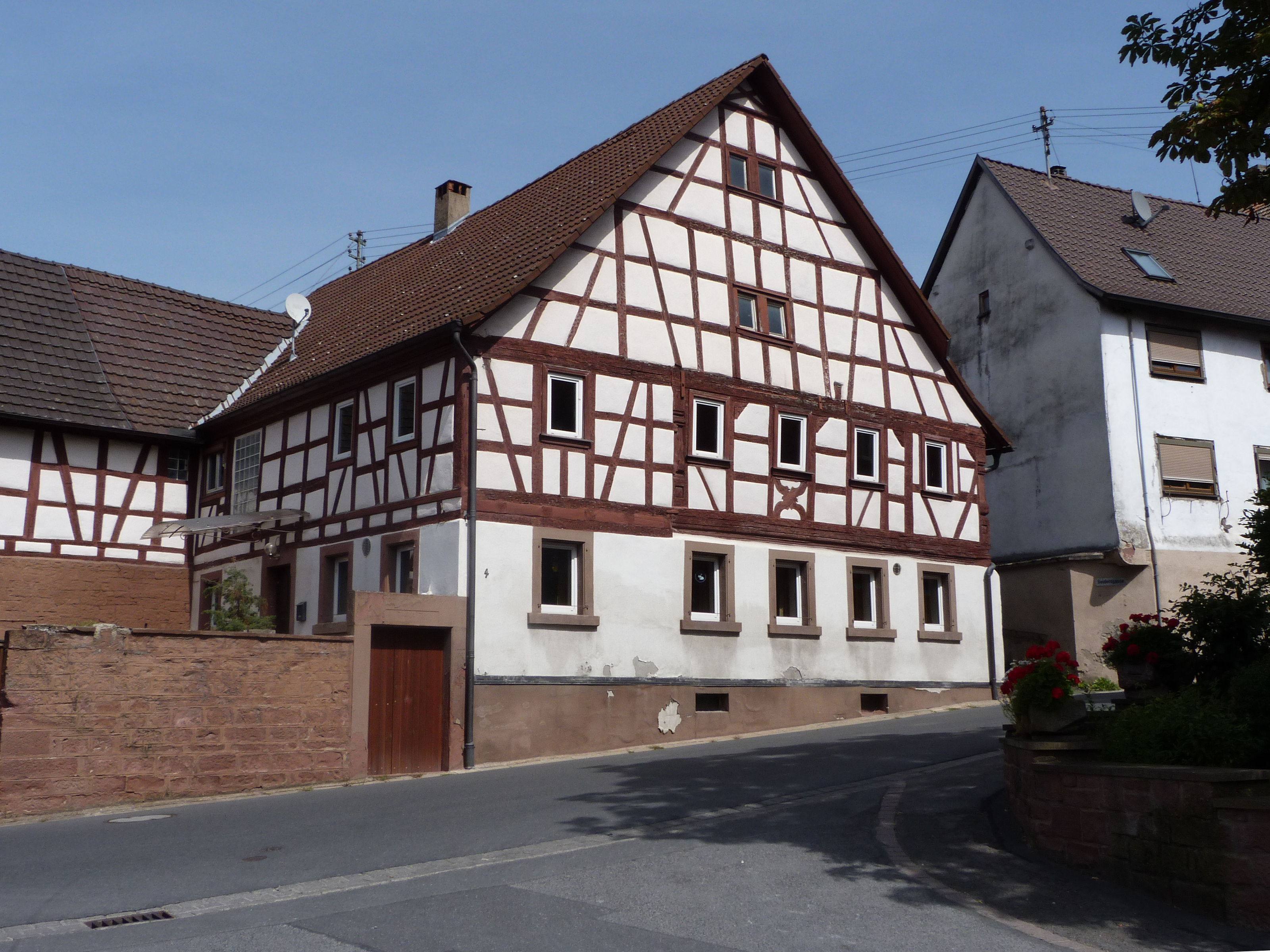 Gasthof Engel in Holzkirchen, Unterfranken